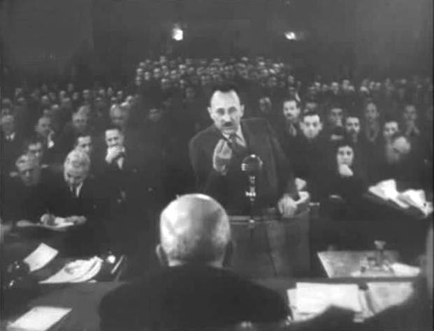 Принц Кирилл Болгарский, Князь Преславский на заседании "Народного суда".